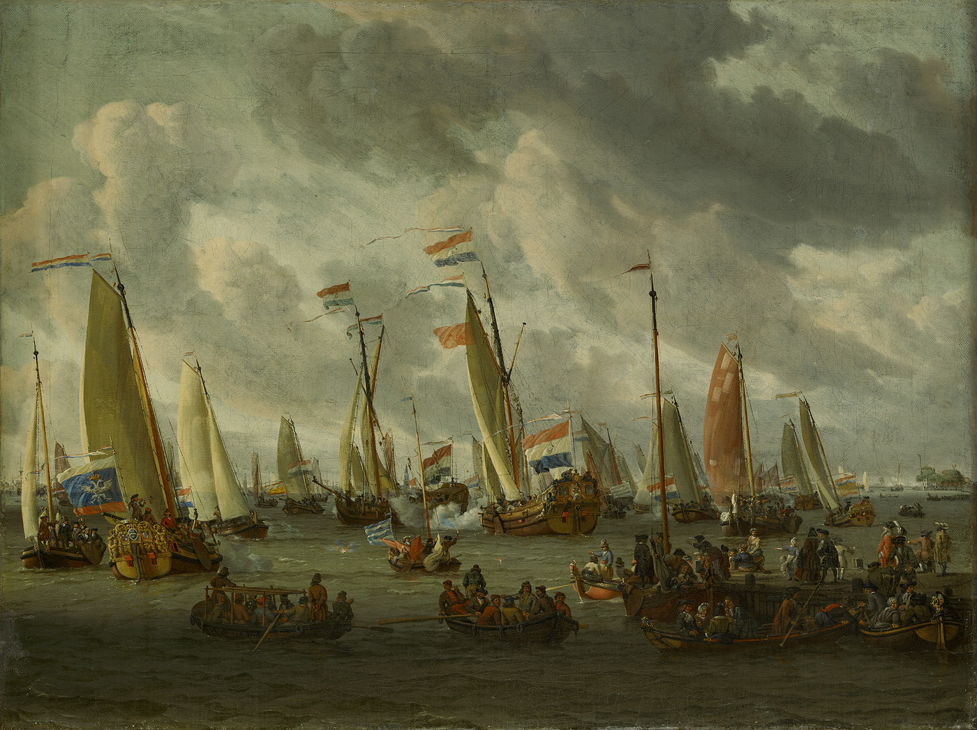 schilderij; krijgsbedrijf; geschiedenis (iconografie); IJ; IJhaven; Montelbaanstoren; Oude Kerk; Spiegelgevecht op het IJ ter ere van het Moskovisch gezantschap